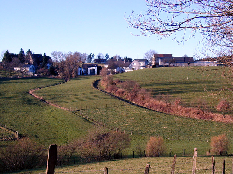 Dorf Eistringhausen, selbst 2002 fotografiert, GFDL